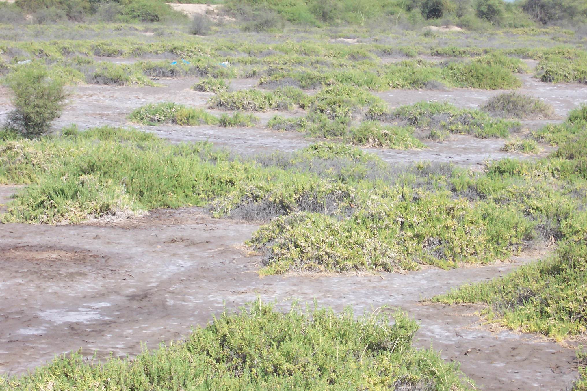 Afloramiento de sal en suelos bajos con el nivel freático poco profundo. Autor: Alfredobi Lugar: Valle del Bajo Piura, Perù Fecha: marzo 2006 El pie de foto no expresa correctamente el termino en castellano. Salificación: de Salificar que es convertir en sal una sustancia. Debe ser Salinización: de Salinizar que es Aumentar considerablemente el contenido de sal de aguas o terrenos.